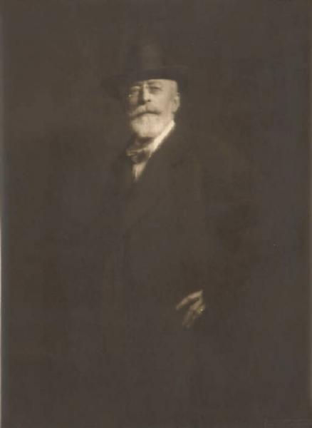 Emilio Gola fotografato da Emilio Sommariva